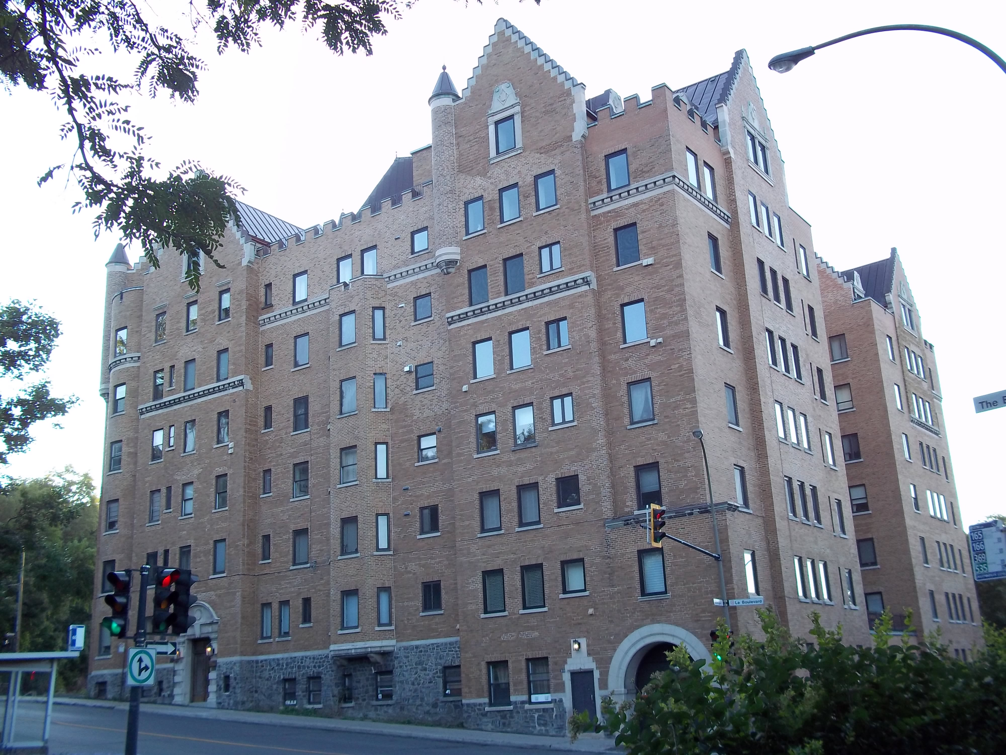 Immeuble Trafalgar, 3980, chemin de la Côte-des-Neiges, Montréal